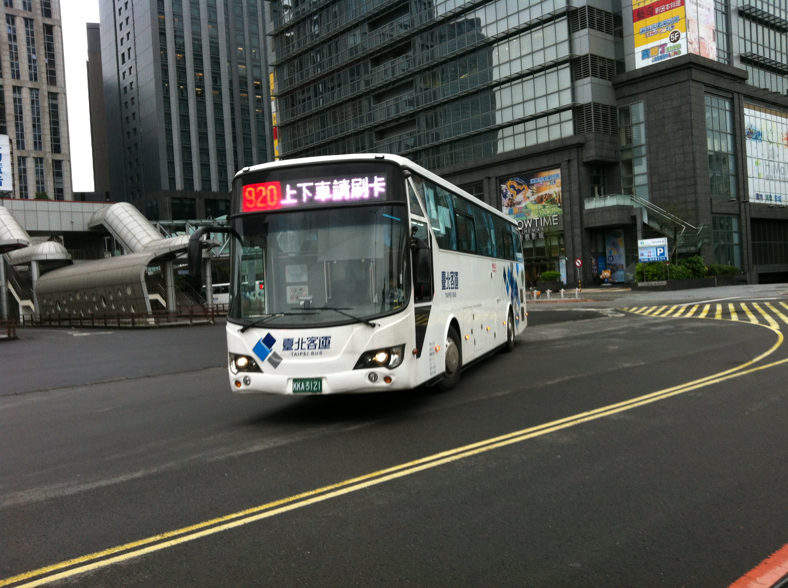 北客44I3OIUF4